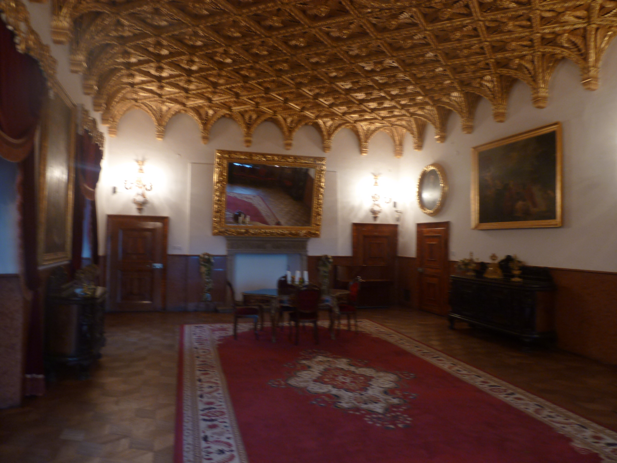 Zlatá sála na Bojnickom zámku